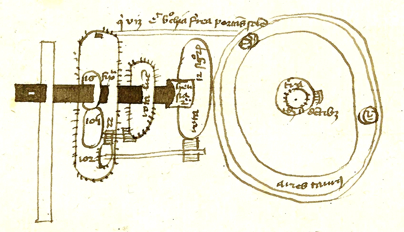 Dessin à main levée de rouages d'une horloge astronomique (mouvements de la Lune et du Soleil).